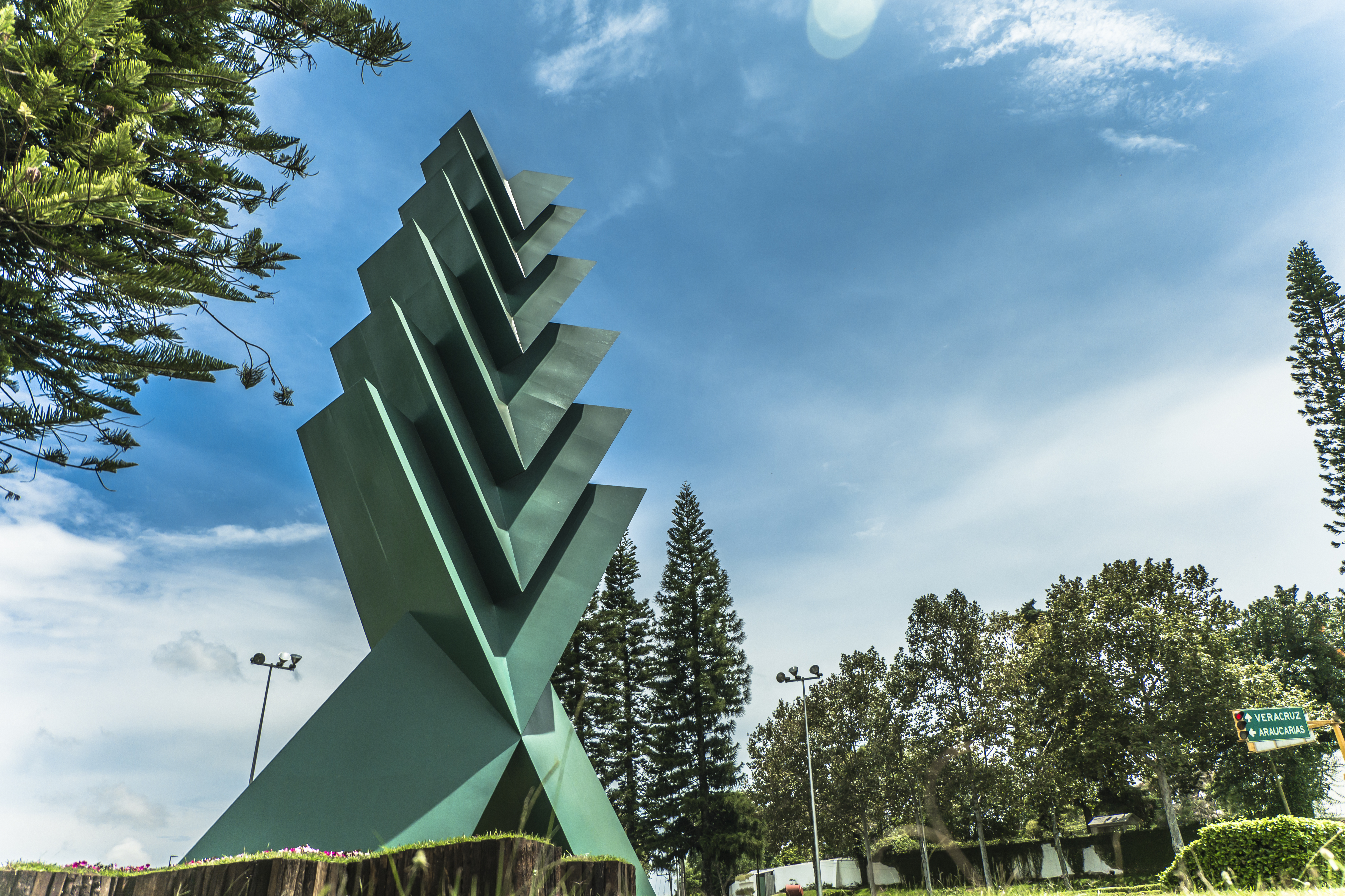 Vista de "La Araucaria" de Enrique Carbajal, en Xalapa, Veracruz. Escultura colocada en el cruce de las avenidas Lázaro Cárdenas, Araucarias y 20 de Noviembre.